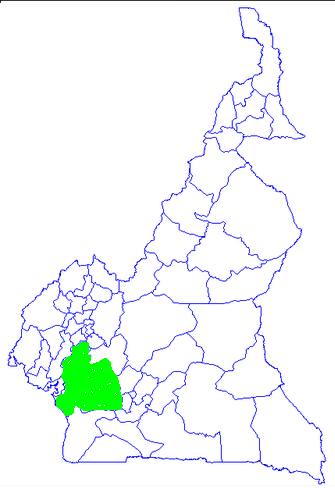 район диалекта баса